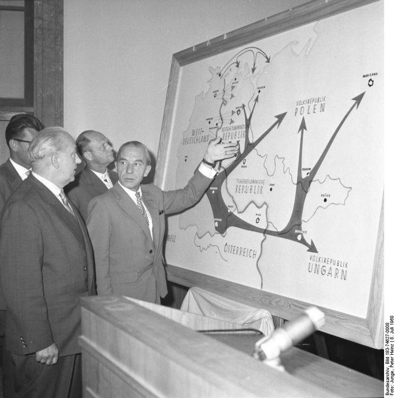 Zentralbild/Junge 8.7.1960 Internationale Pressekonferenz des Ausschusses für Deutsche Einheit - Bundeswehr-Major Bruno Winzer gab Erklärung ab Aufschlußreiche Enthüllungen über den aggressiven, faschistischen Charakter der Bonner Bundeswehr unterbreitete am 8.7.1960 auf einer internationalen Pressekonferenz des Ausschusses für Deutsche Einheit der in die DDR geflüchtete Major der Bundeswehr Bruno Winzer der Öffentlichkeit. In einer Erklärung stellte er fest, dass ihn die zunehmende Faschisierung der Bonner Bundeswehr und des gesamten Bonner Staatsapparates bewogen hat, der Bundesrepublik den Rücken zu kehren. UBz.: An Hand dieser Karte erklärte Bruno Winzer (rechts) den Plan Bonns zum Überfall auf sozialistische Staaten und Österreich. Erster v.l. der Sekretär des Ausschusses für Deutsche Einheit, Adolf Deter; zweiter v.l. der militärpolitische Mitarbeiter des Staatlichen Rundfunkkomitees, Dr. Egbert von Frankenberg.